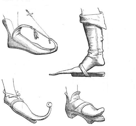 Abbildungen zu Schnabelschuhen